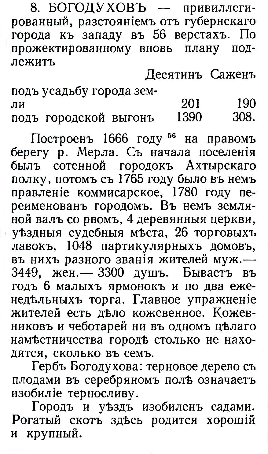 В "Топографическом описании Харьковского наместничества" 1788 года описание уездного города Богодухова в разделе "О городах".